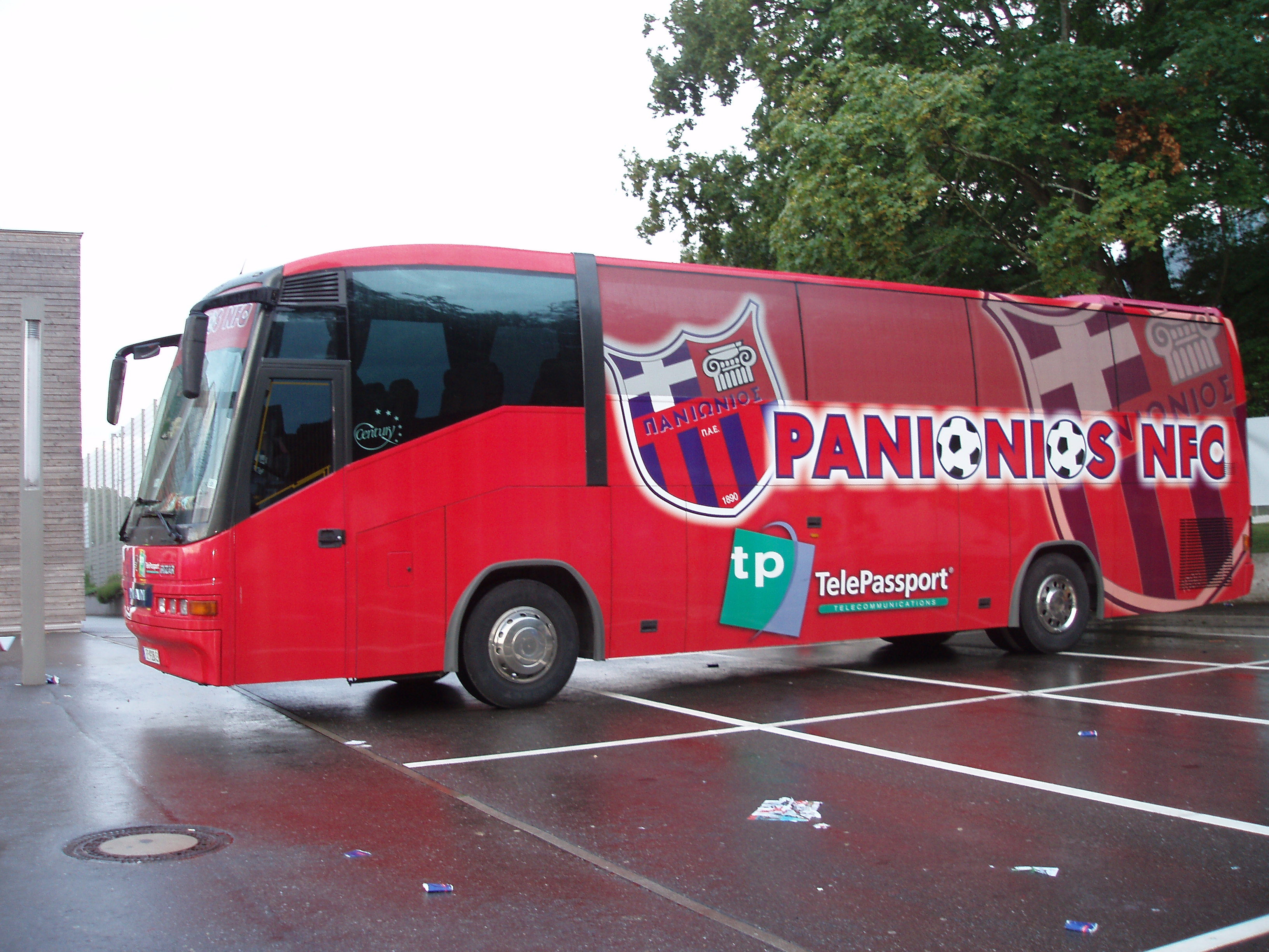 Mannschaftsbus (SC Freiburg - Panionios Athen 1:0)